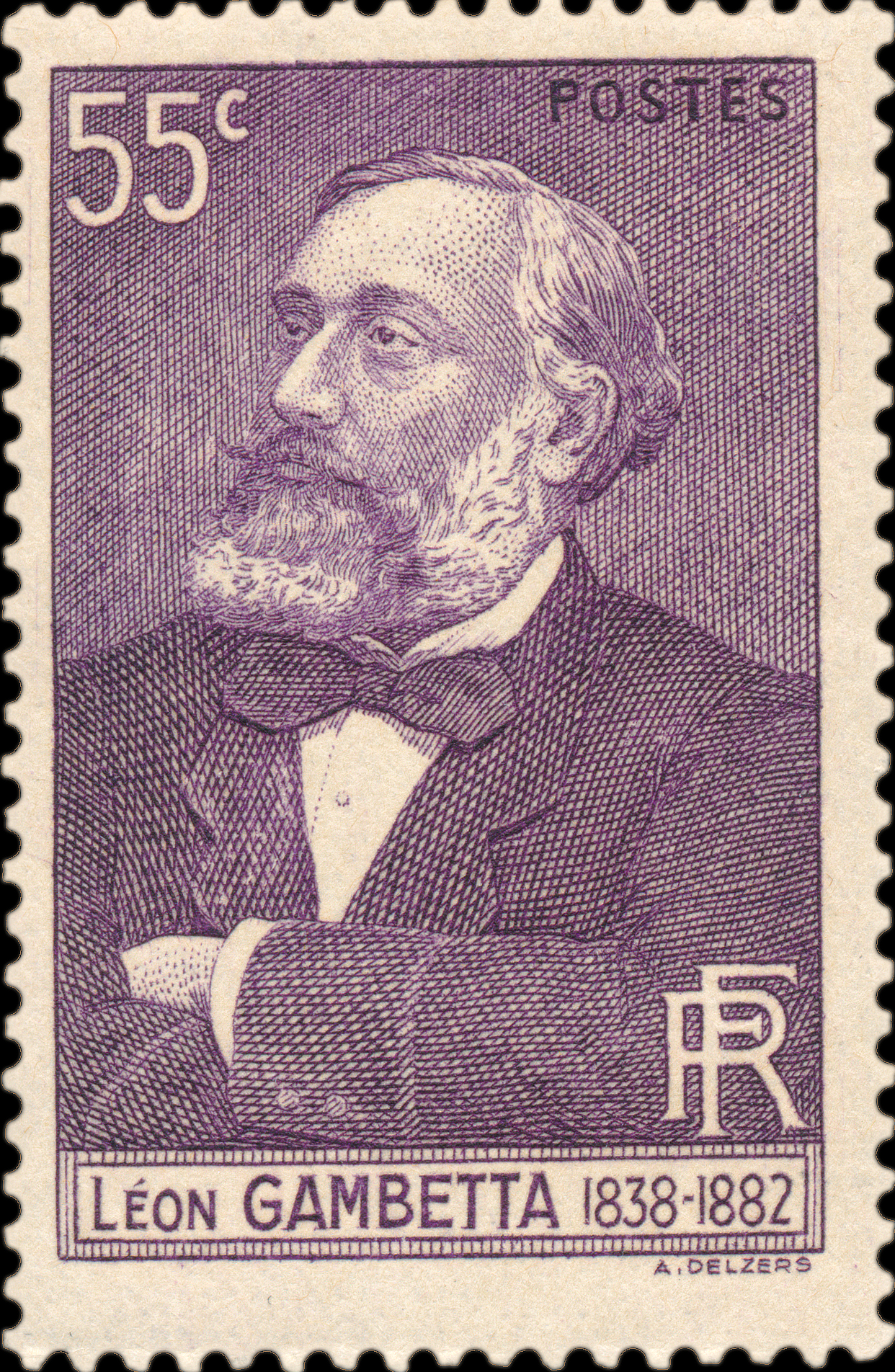 Tmbre du centenaire de la naissance de Léon Gambetta